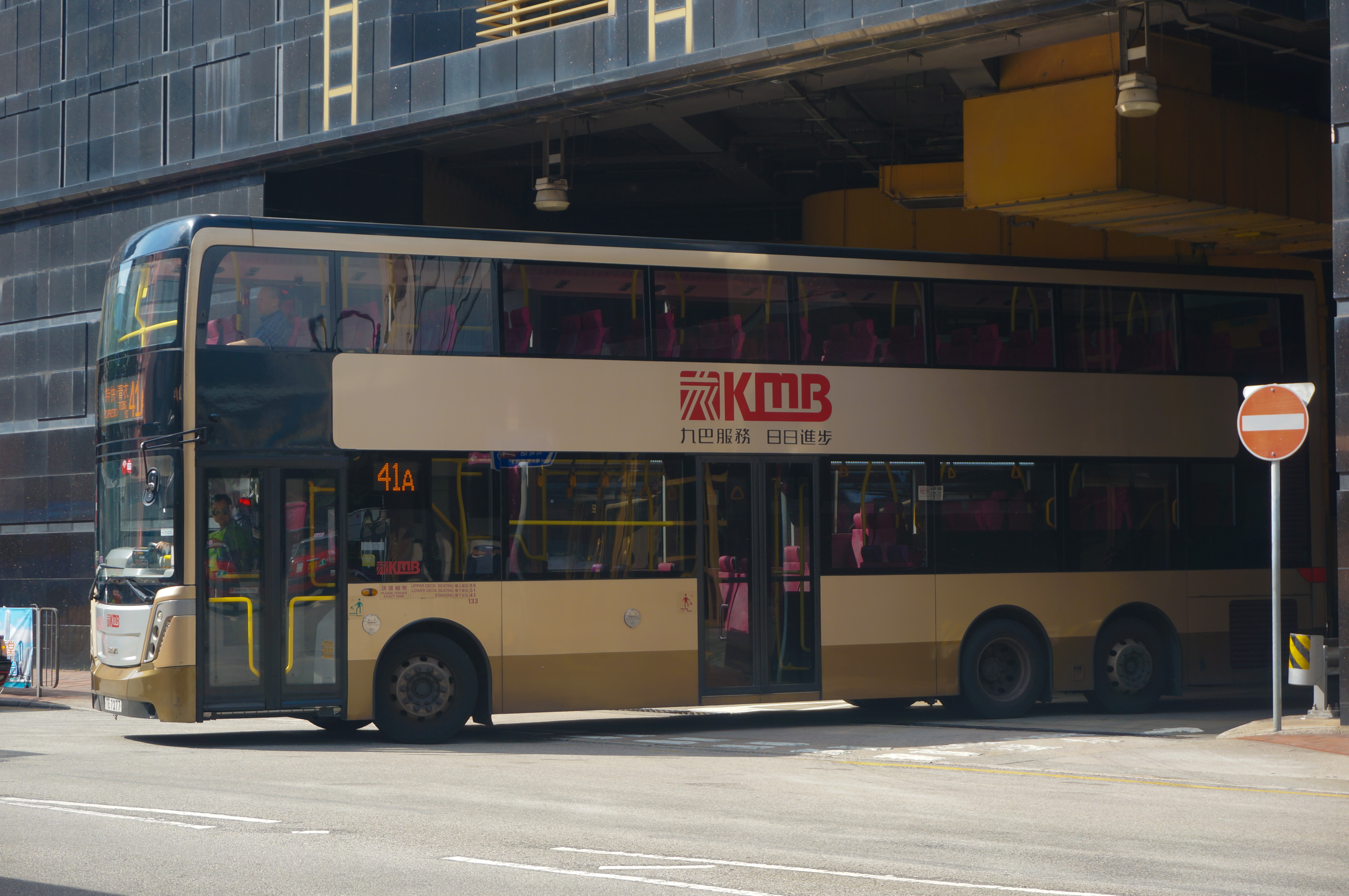 （TE7277/ASUD1）行駛九龍巴士41A線